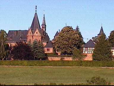 Stiftungsanlage Puricelli-Stift Rheinböllen